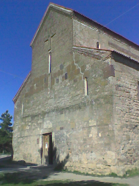 ურბნისის სიონი